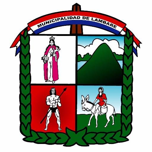 Escudo de la ciudad de Lambaré en Paraguay